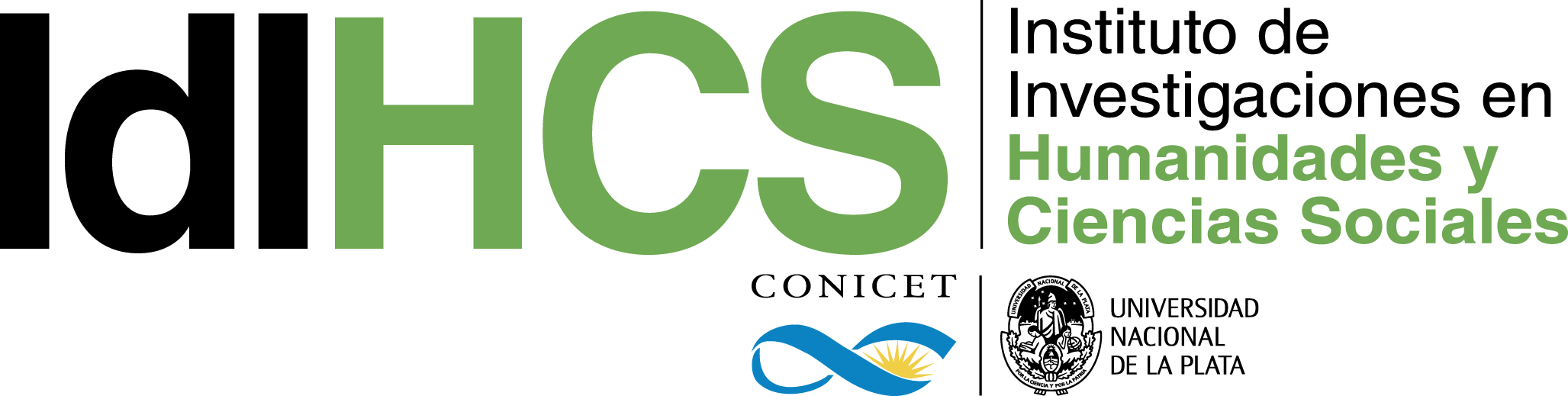 Logo del Instituto de Investigaciones en Humanidades y Ciencias Sociales - FaHCE UNLP